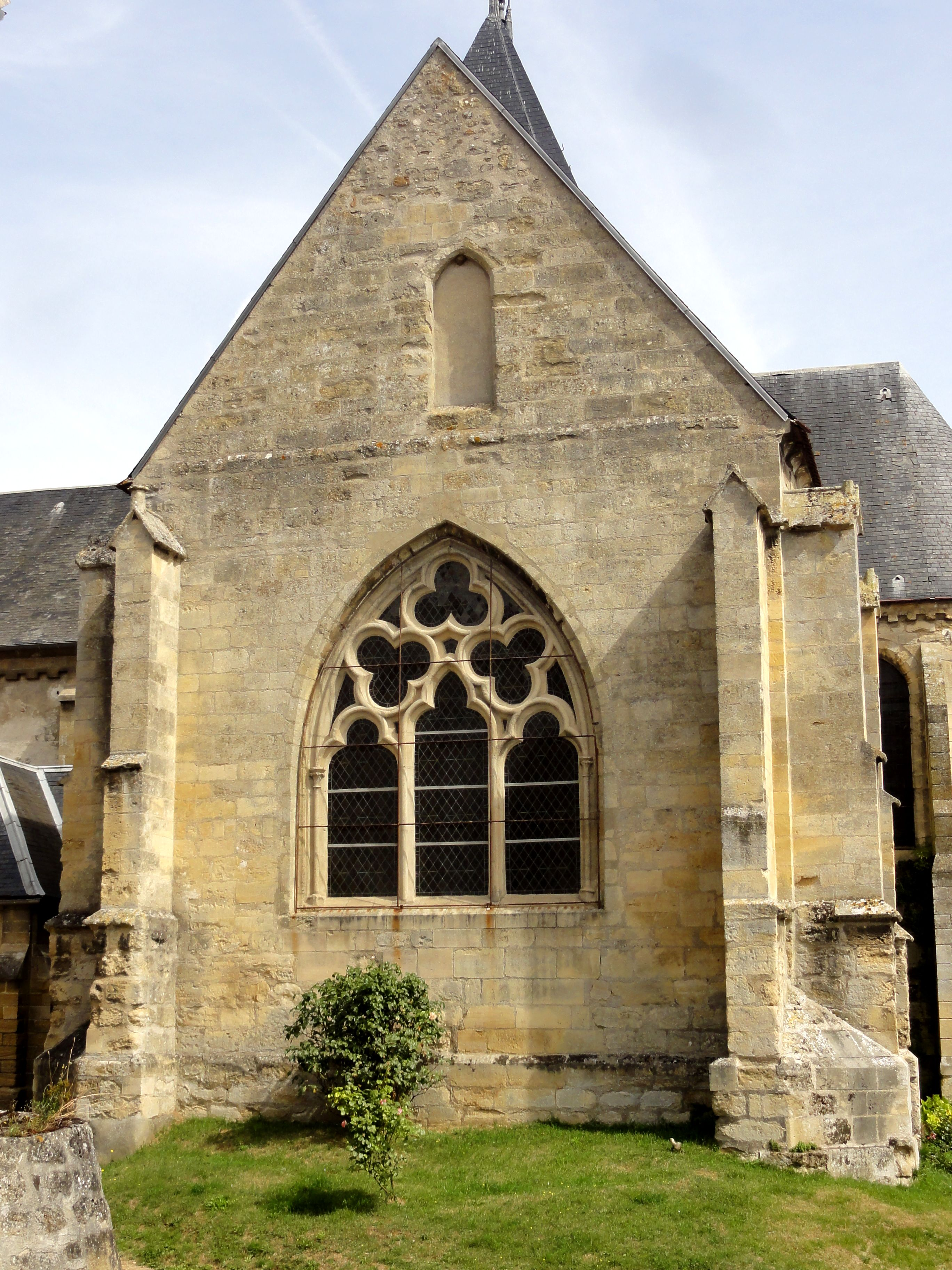 Croisillon sud.